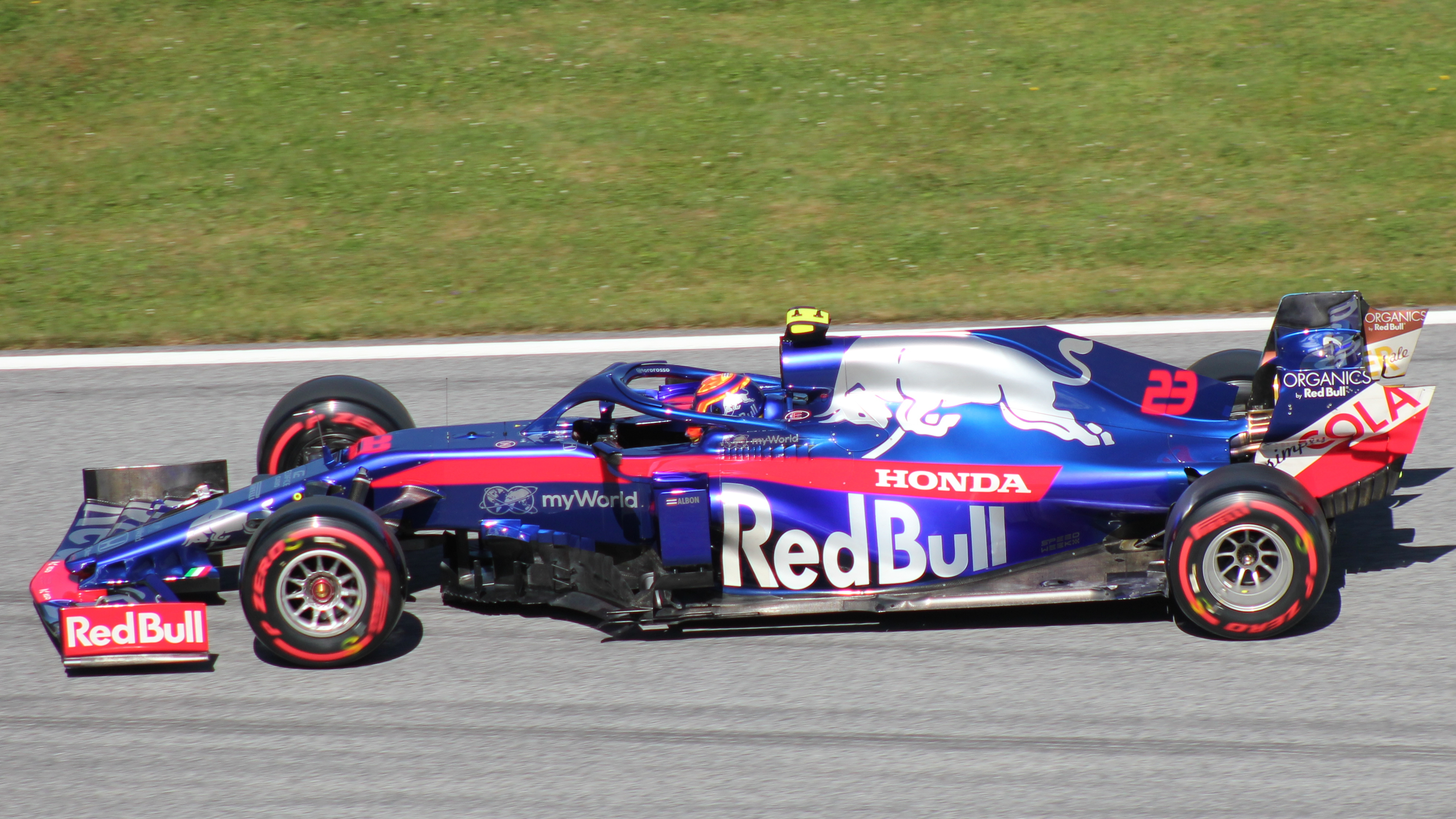 Albon beim Rennwochenende in Österreich 2019